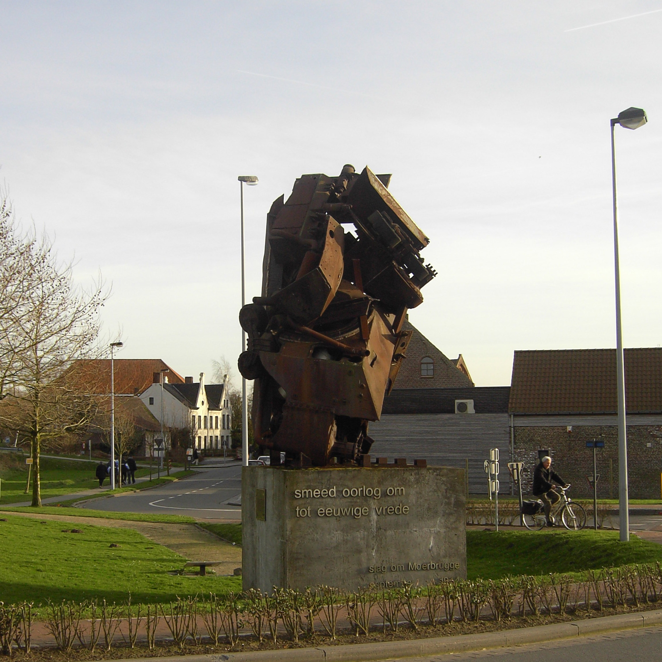 Moerbrugge - Oostkamp - Belgium - Oorlogsmonument voor de Canadezen, slag van 1944.